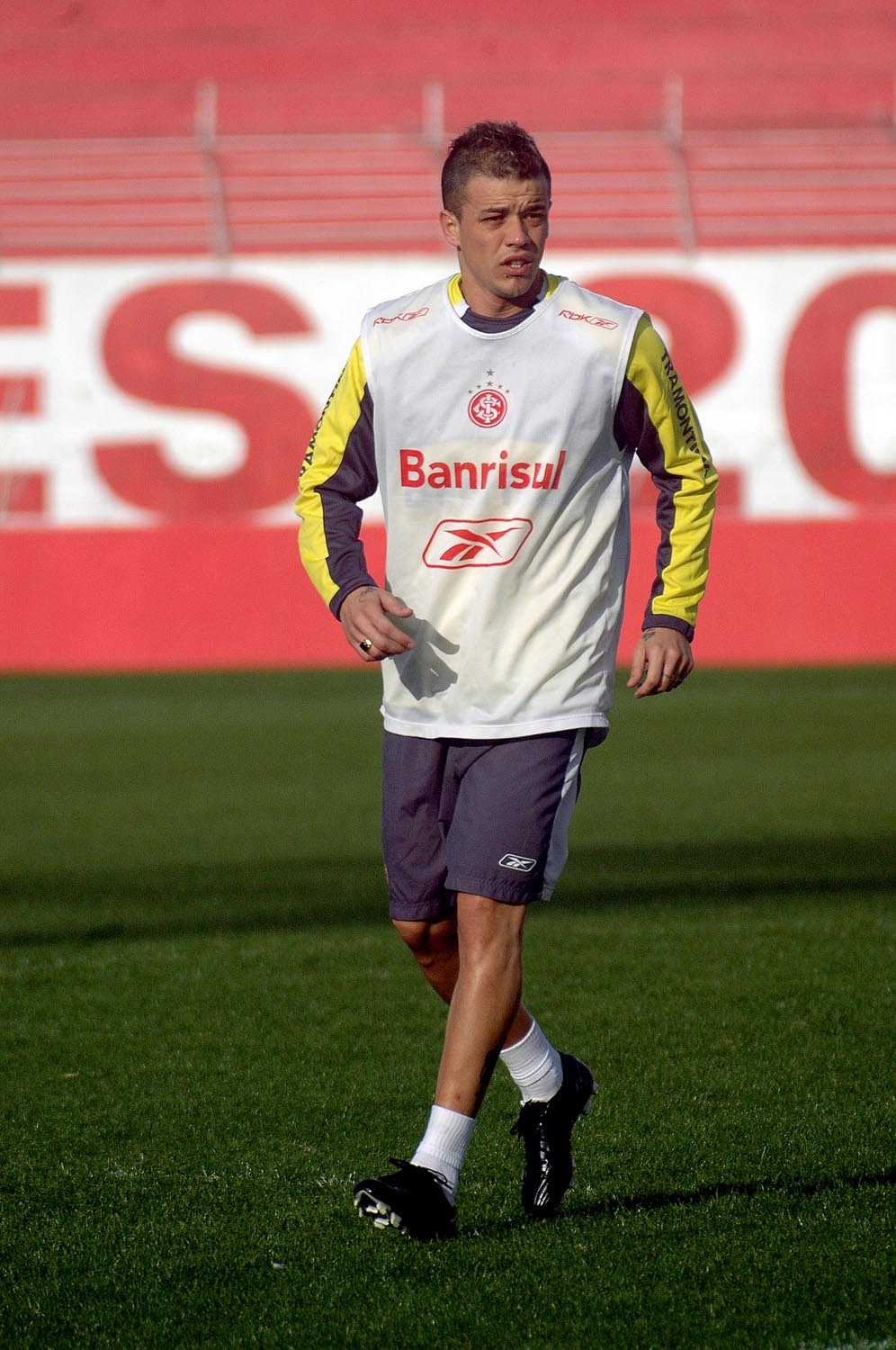 D´alessandro